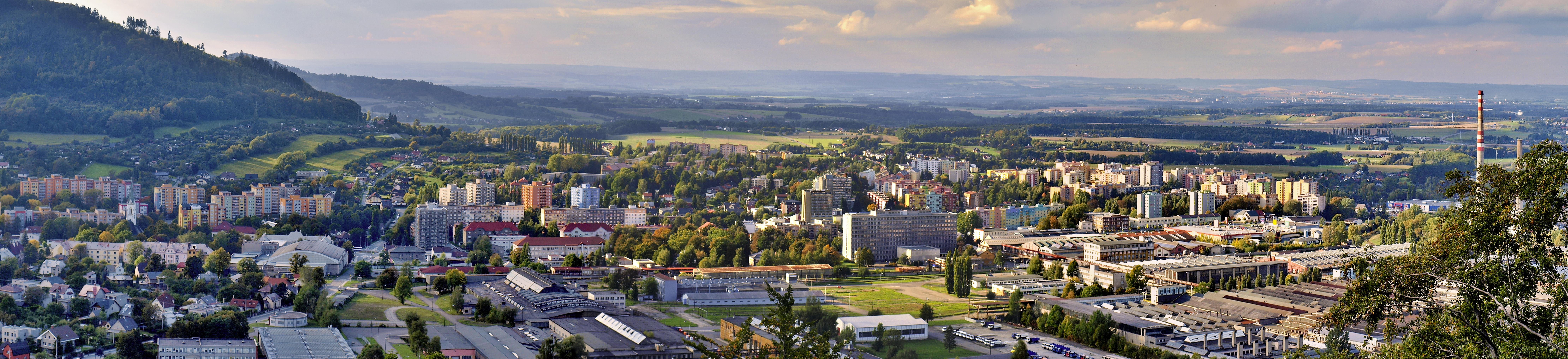 Výhled na Kopřivnici z Bezručovy vyhlídky.